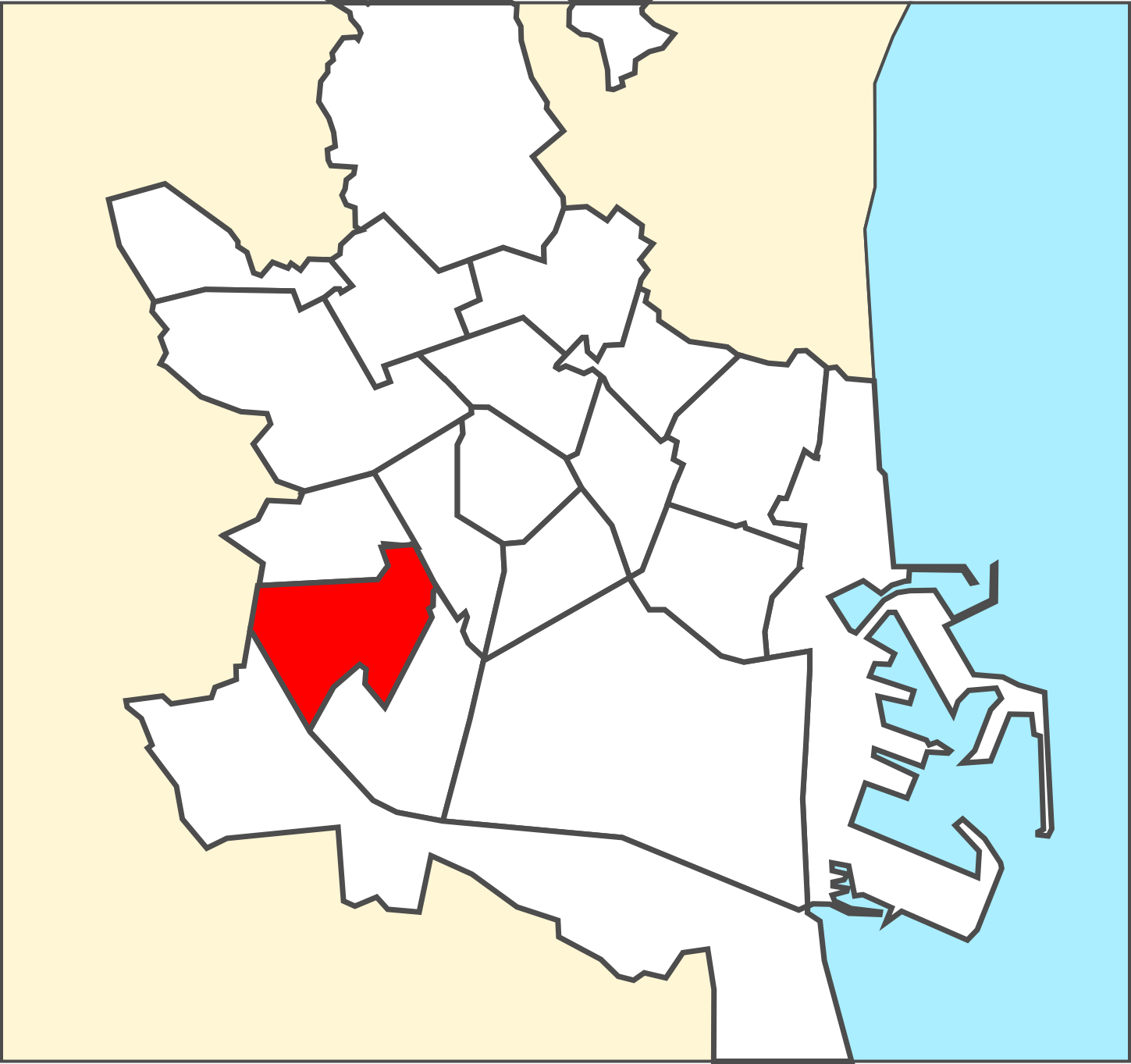 Districte de Patraix.